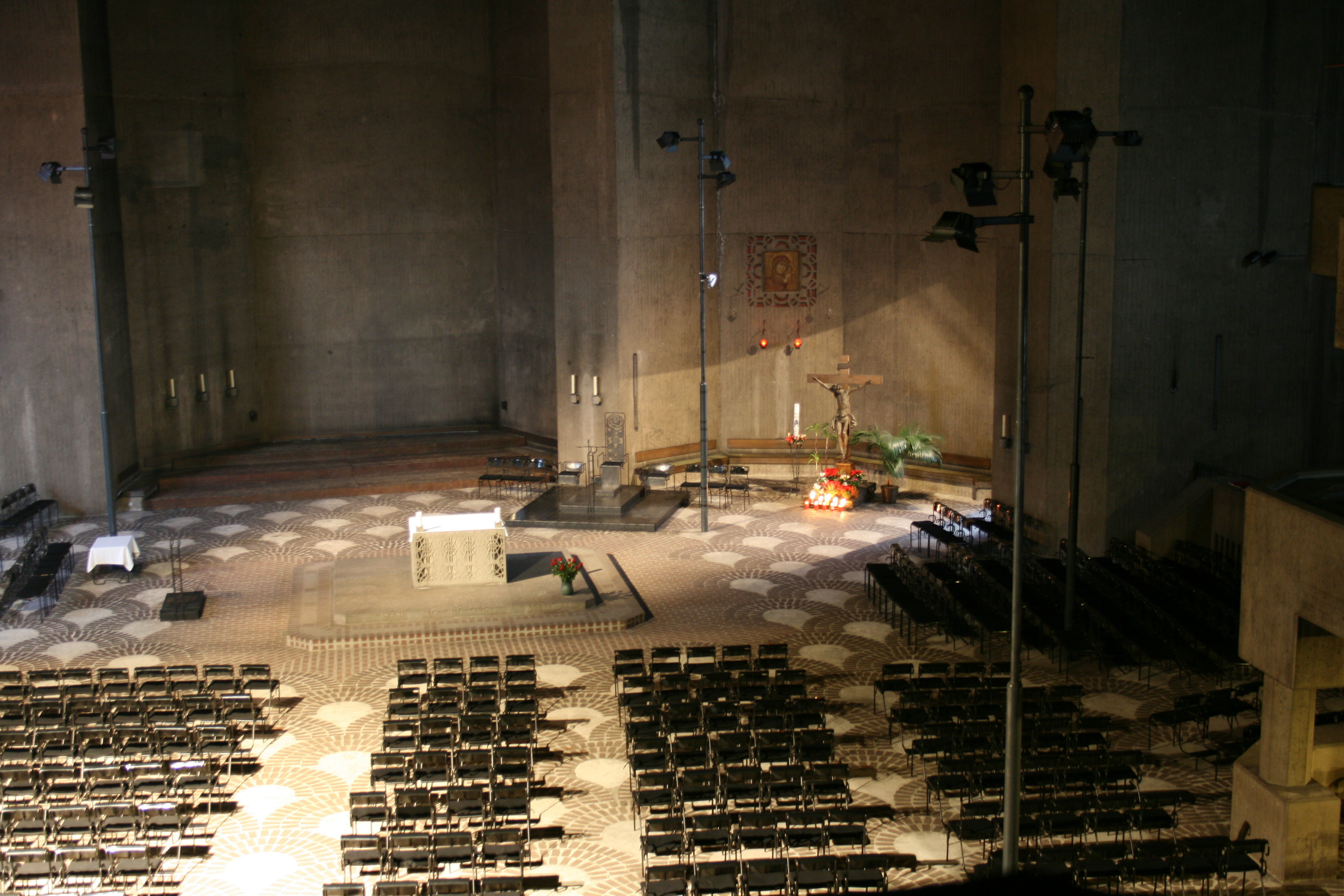 Maria Königin des Friedens, Wallfahrtsdom in Velbert-Neviges]